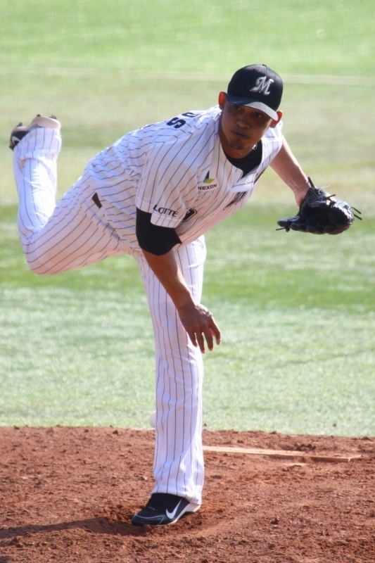 日本プロ野球 千葉ロッテマリーンズ カルロス・ロサ 投手